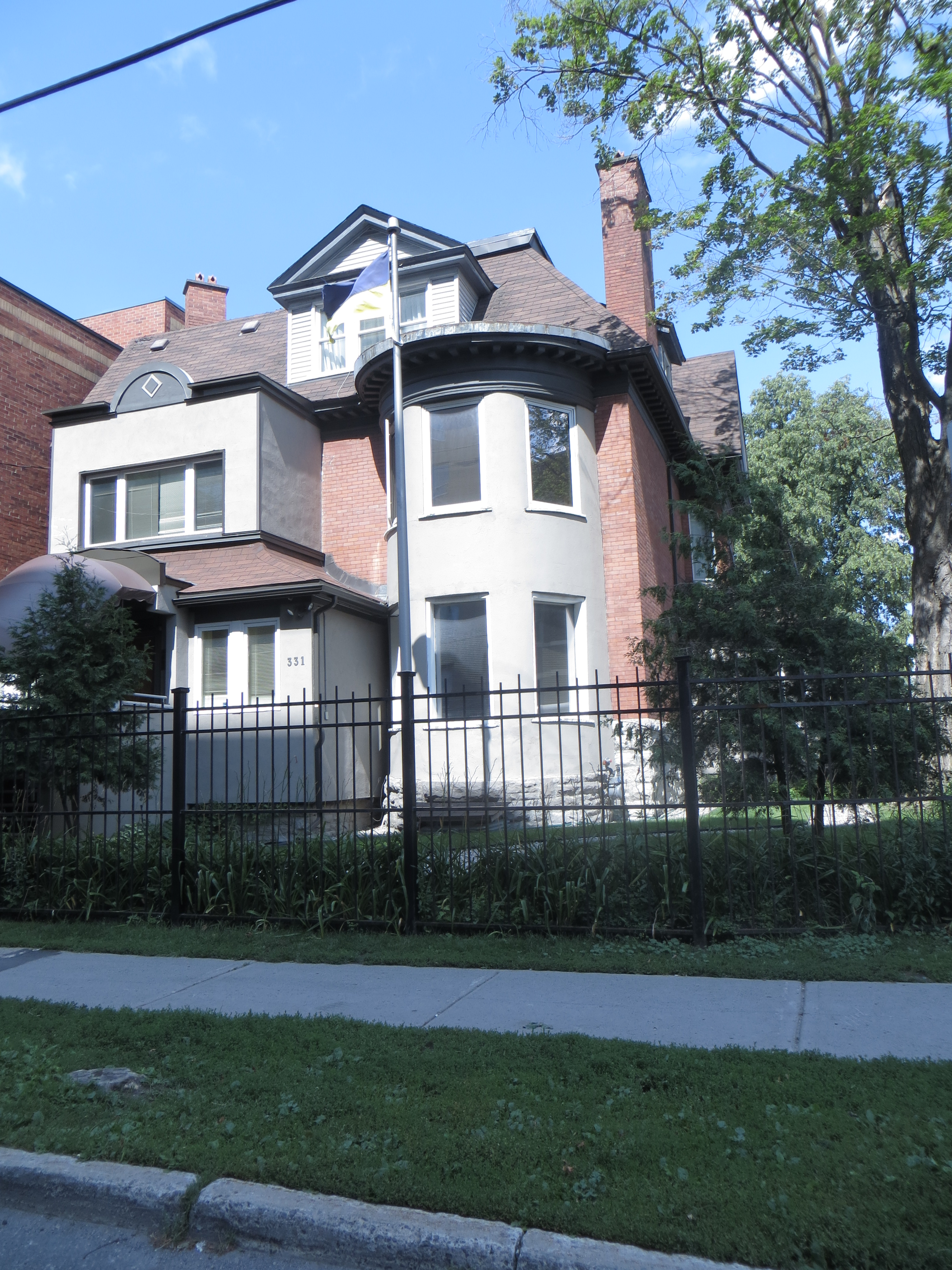 Консульський відділ Посольства України в Канаді (м.Оттава)